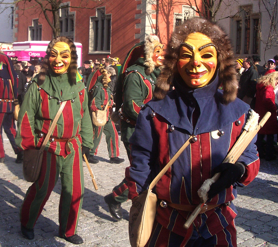 Ravensburg, Germany: Papierkrattler masks at the Narrensprung 2005 carnival parade